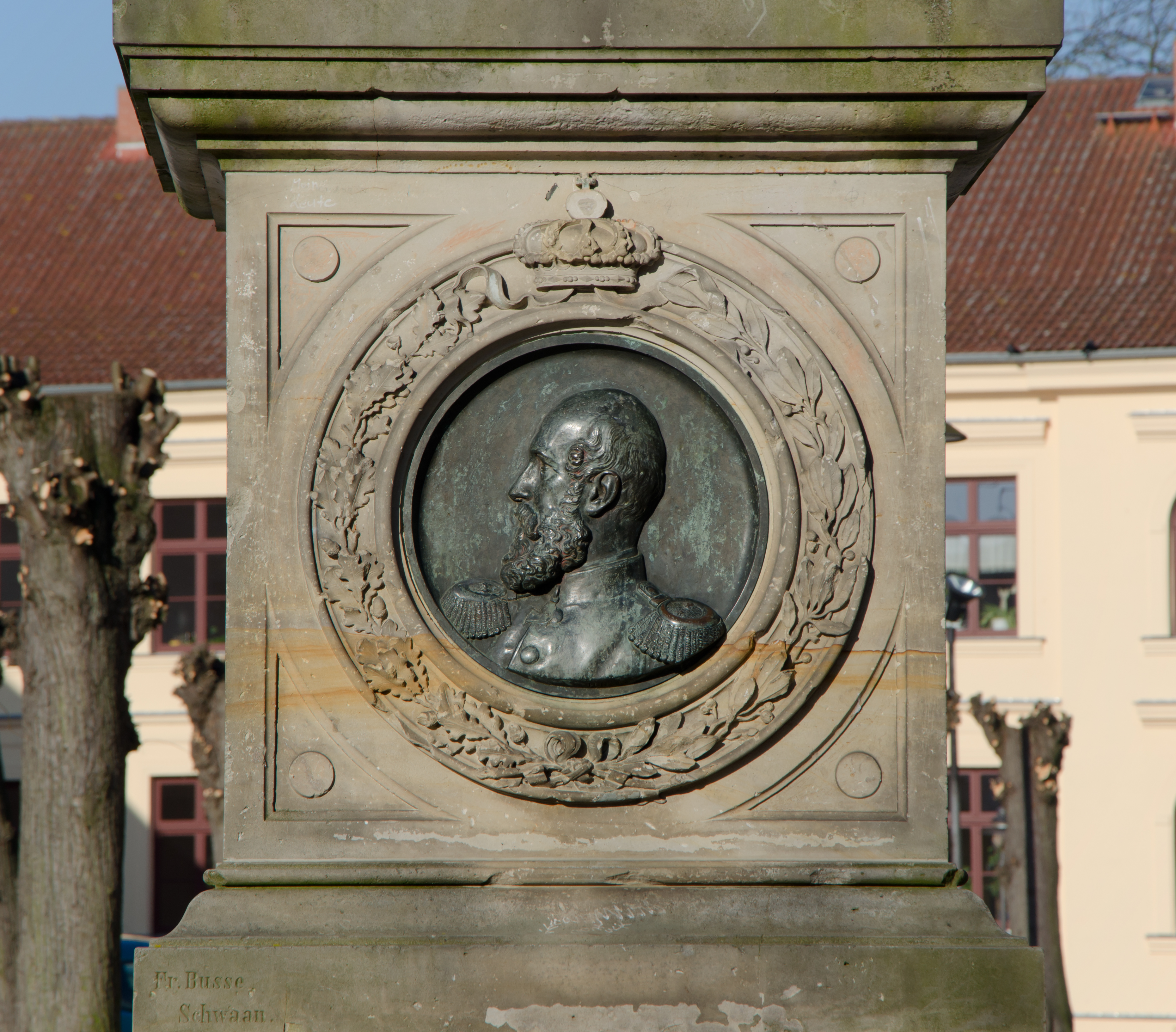 Schwaan Denkmal 1871